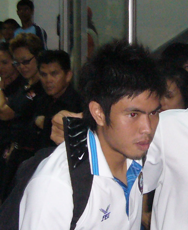 Suttinan Phuk-hom